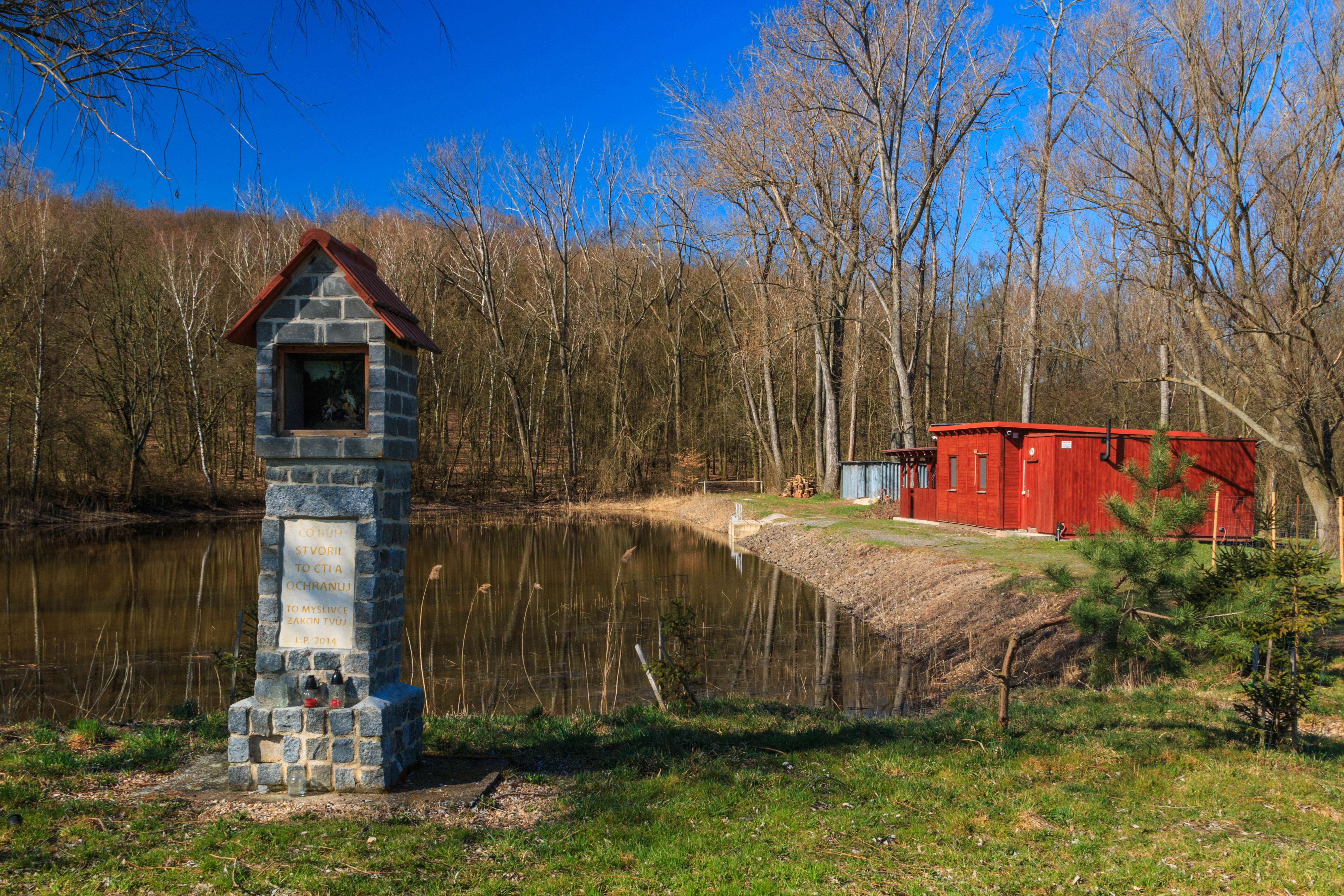 rybníček u Michnovky Project: Vodstvo.